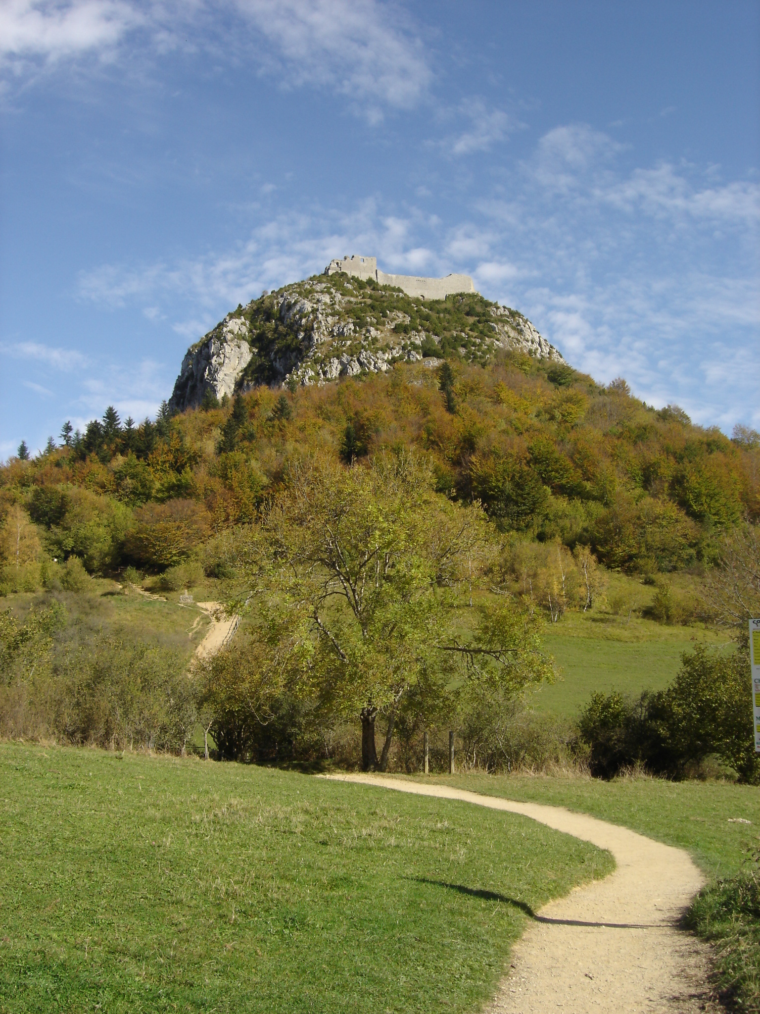 Château de Montségur.